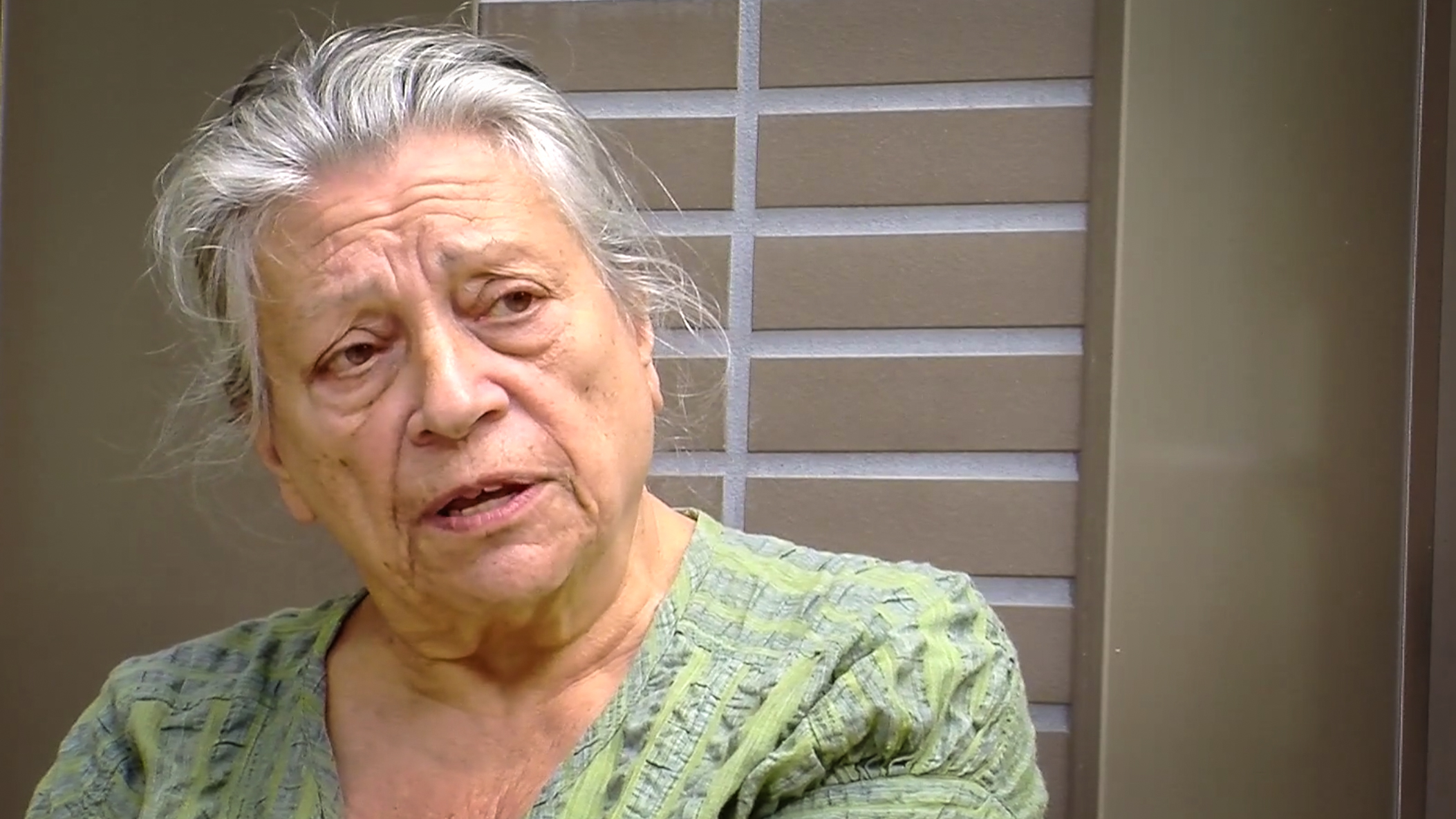 Thérèse Clerc, née le 9 décembre 1927 à Paris, et morte le 16 février 2016, est une militante féministe française.